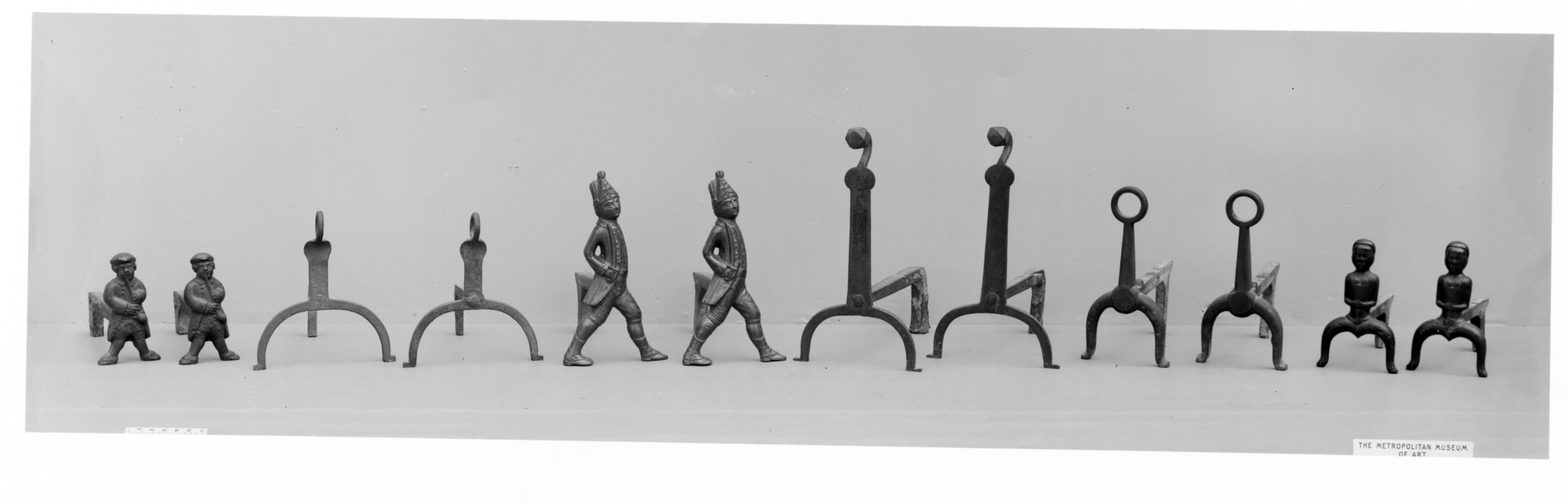 Andiron; Metal